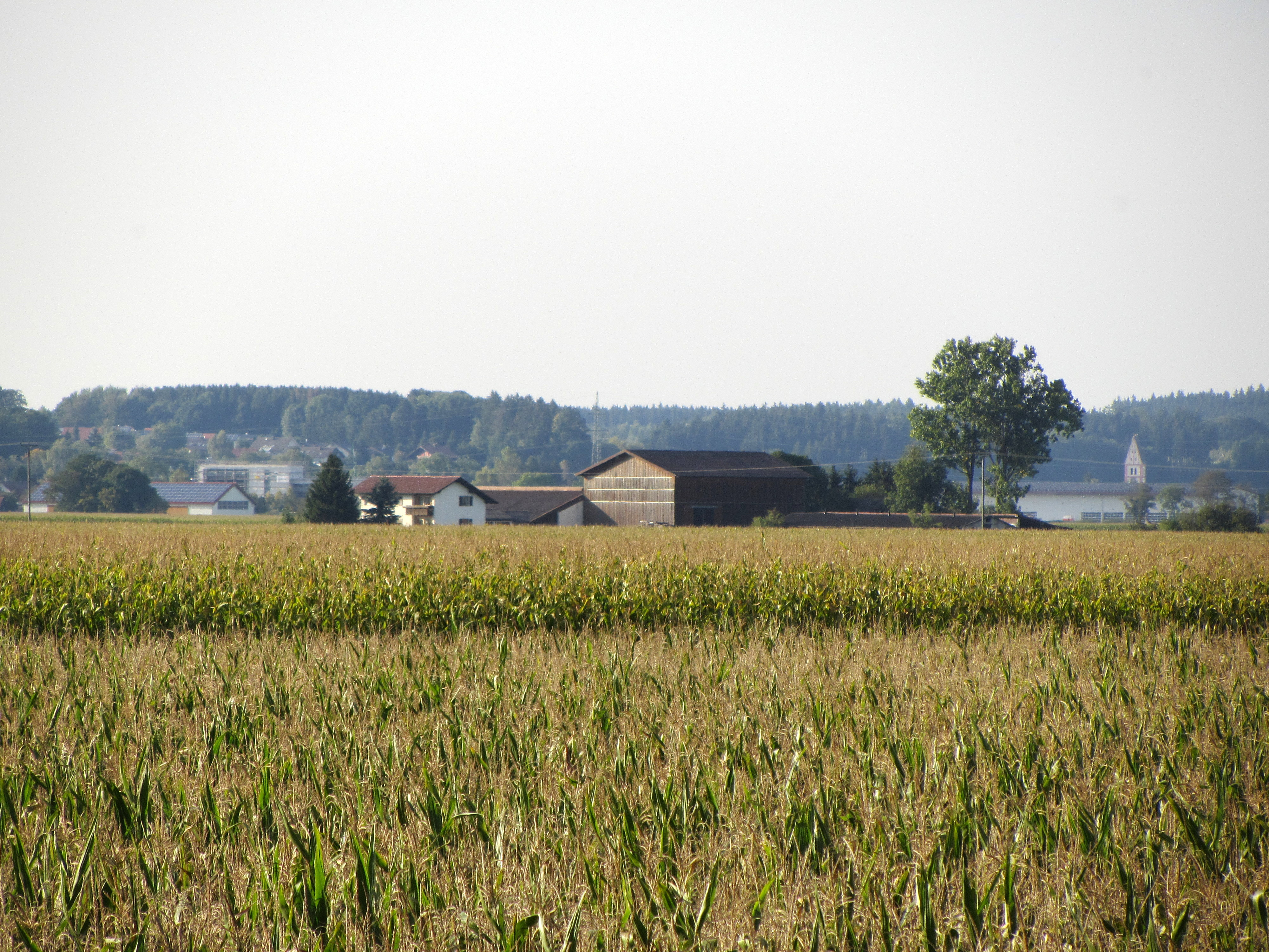 Melchiorhof (Tannheim)